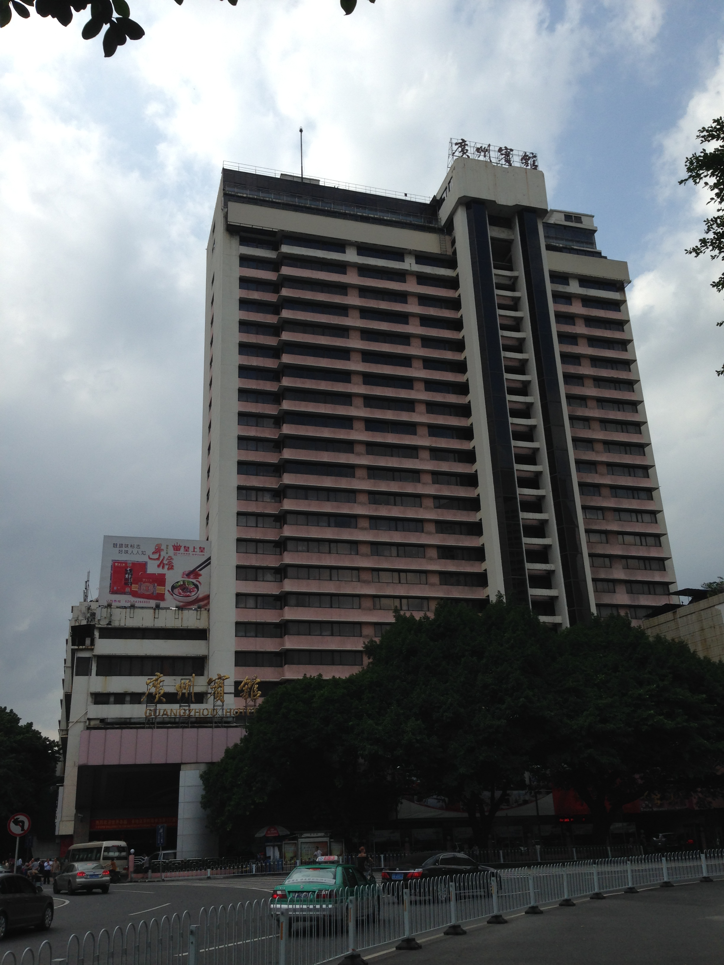 广州宾馆（2015年5月）